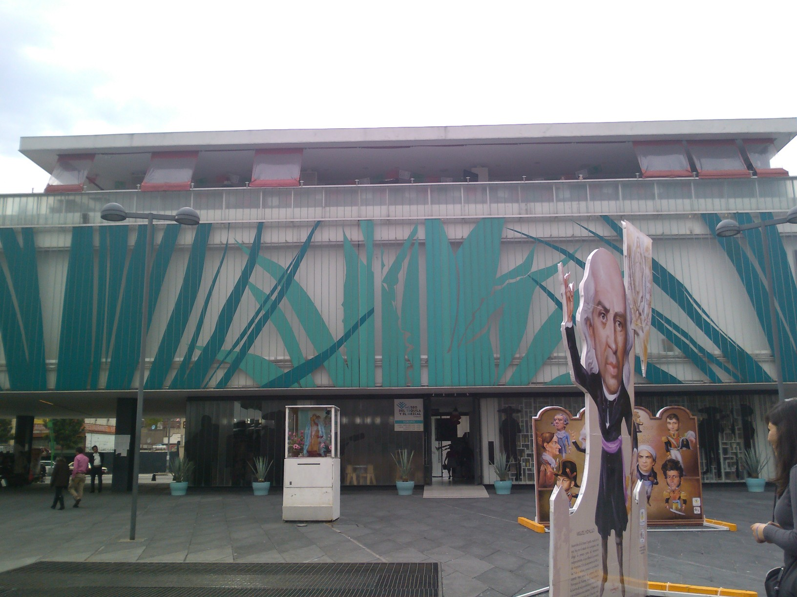 Vista de la explanada del Museo del Tequila y Mezcal.